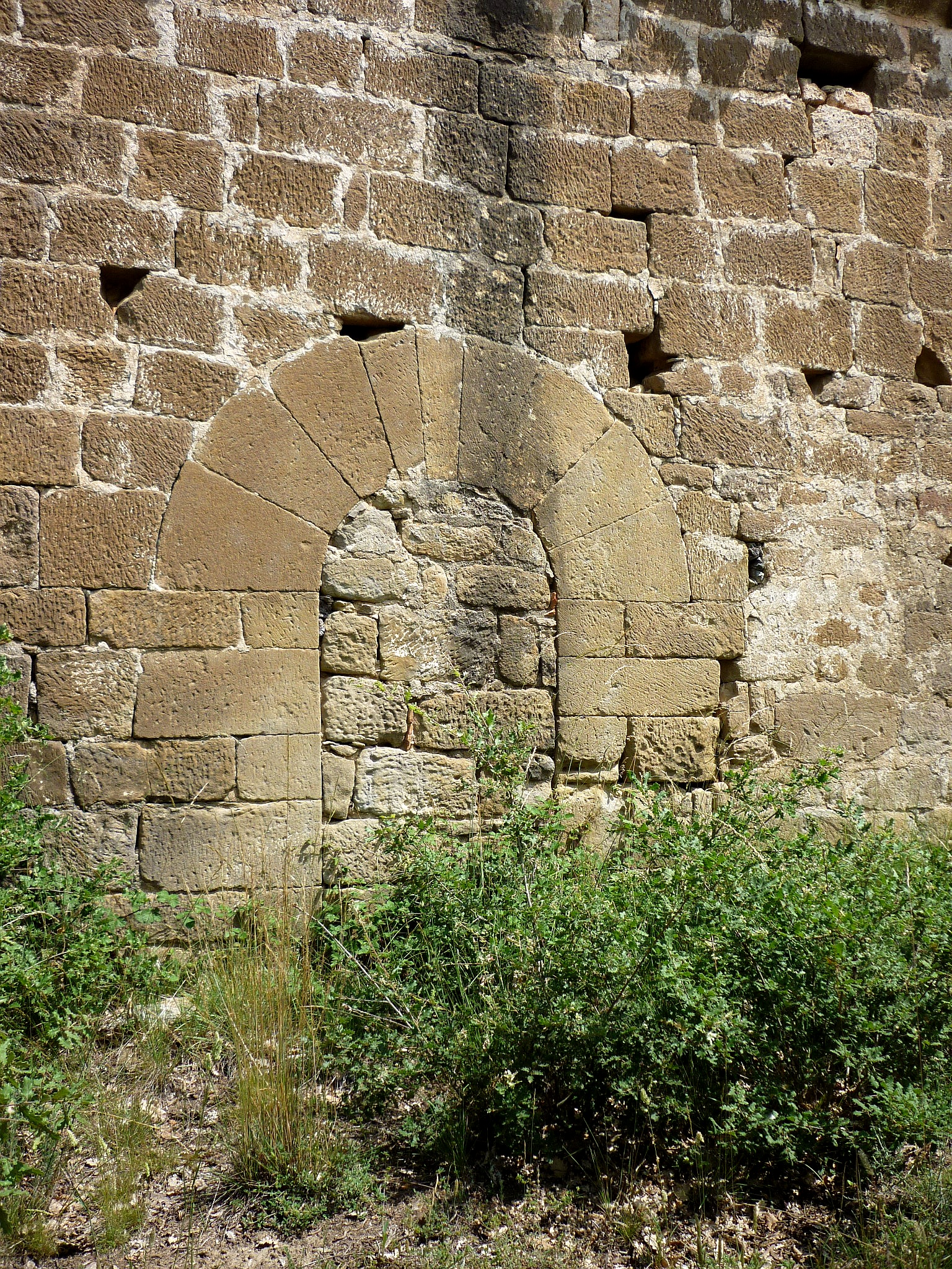 Església de Sant Quirze de la Coma (Llobera): porta lateral tapiada